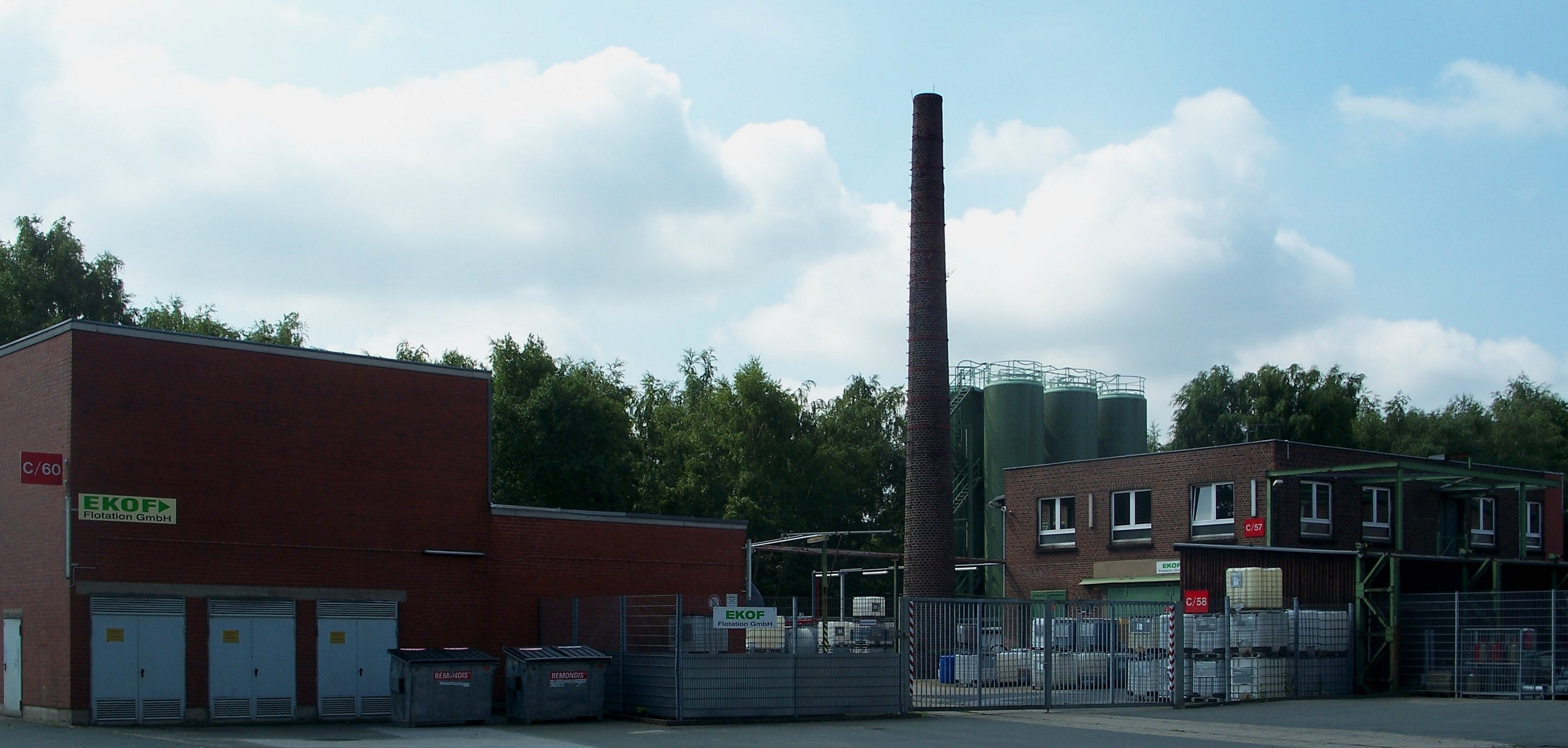 Fabrikanlagen der EKOF Flotation GmbH, einem ehemaligen Betrieb der Westfalia-Dinnendahl-Gröppel AG in Bochum im Juli 2009. Sie stellen den einzigen noch aktiven Betrieb der WEDAG in Bochum dar.